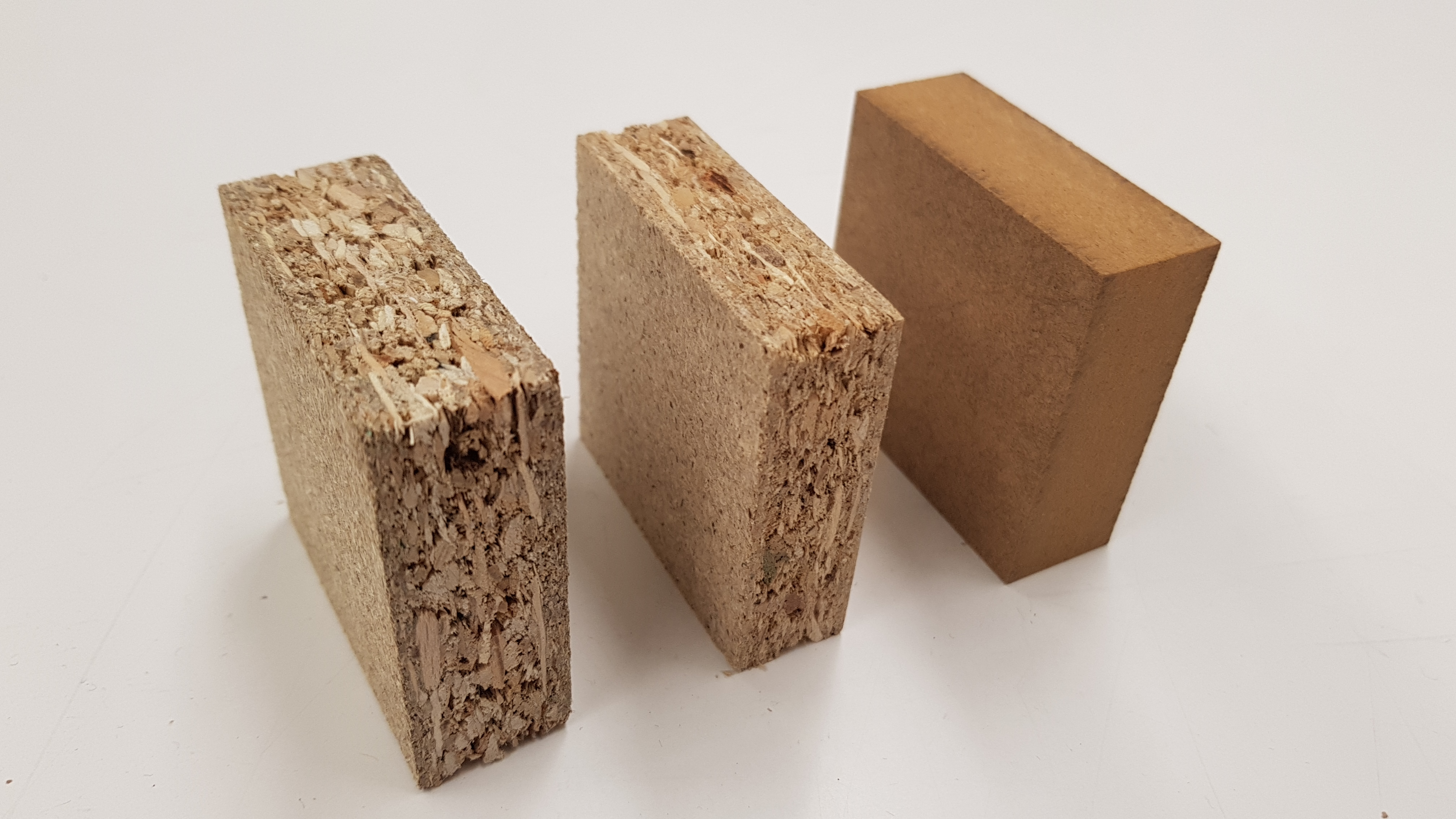 2 Spahnplattenprüfkörper und ein MDF- Prüfkörper